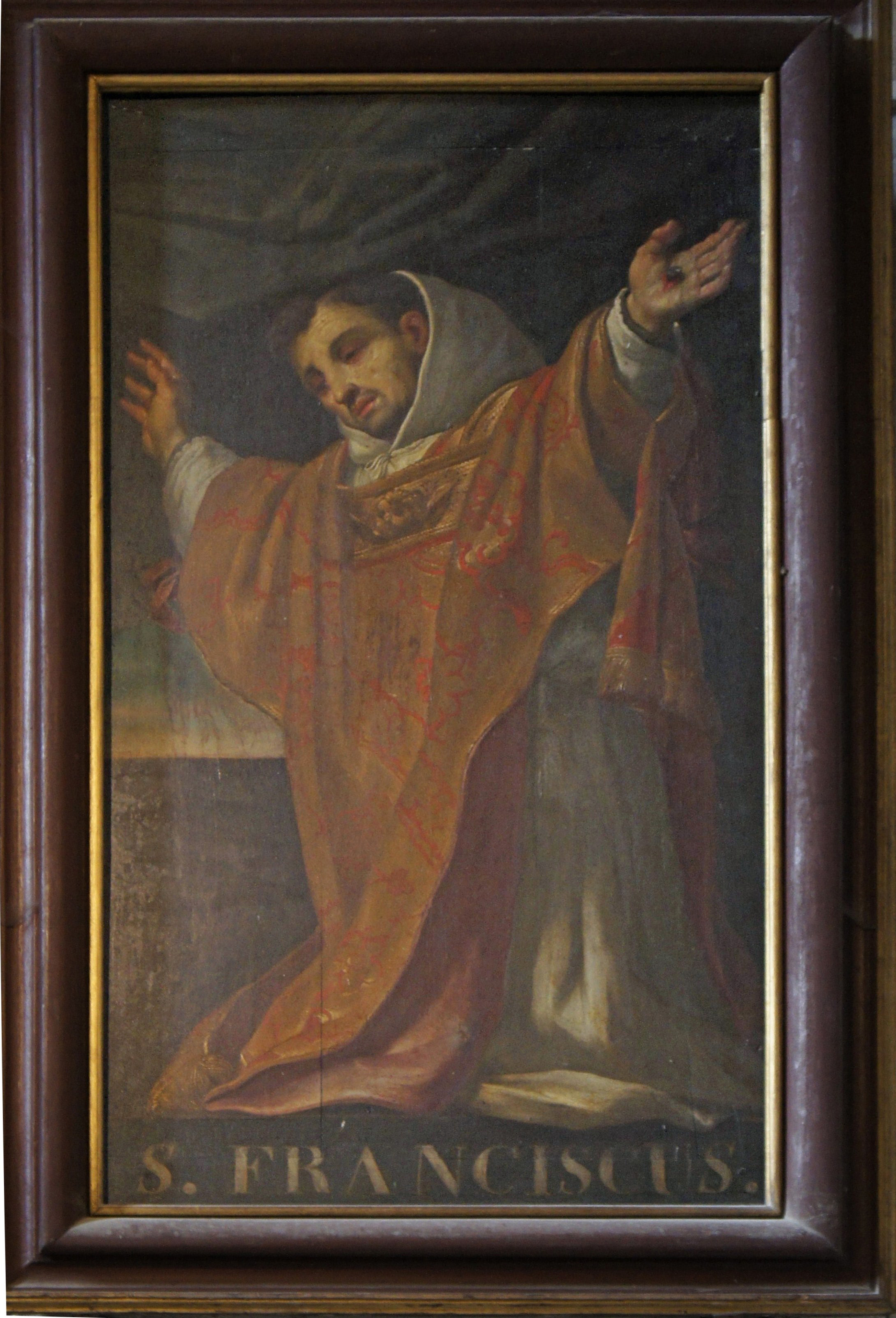 Saint François peint par Claude François dit frère Luc; sur le tableau date : 1615.